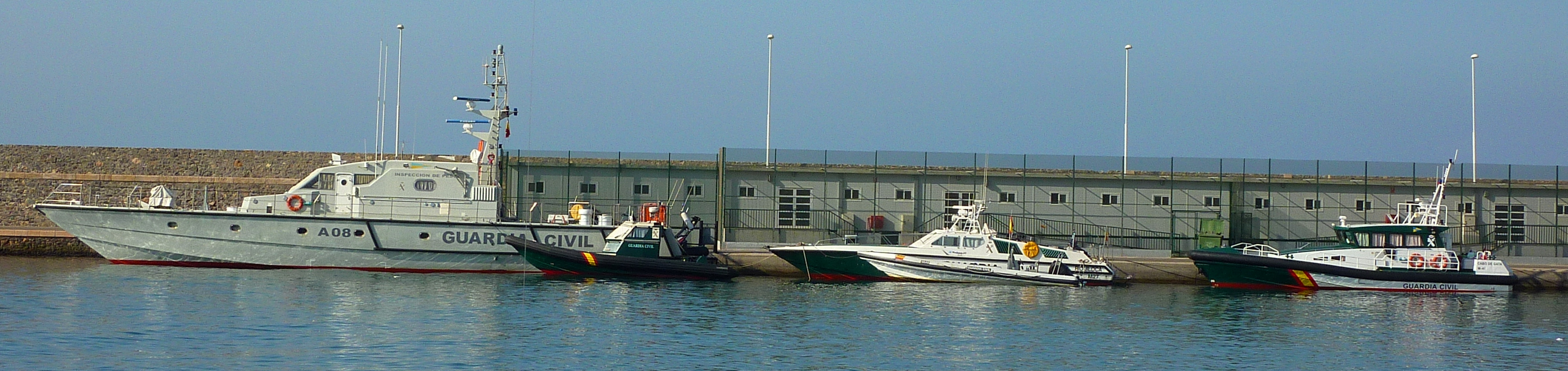 Patrulleras del Servicio Marítimo de la Guardia Civil "Río Almanzora", A08 (clase Rodman-101), "Río Jiloca", M27 (clase Rodman-55 Río Arba) y "Cabo de Gata", M-41 (clase Río Aller).